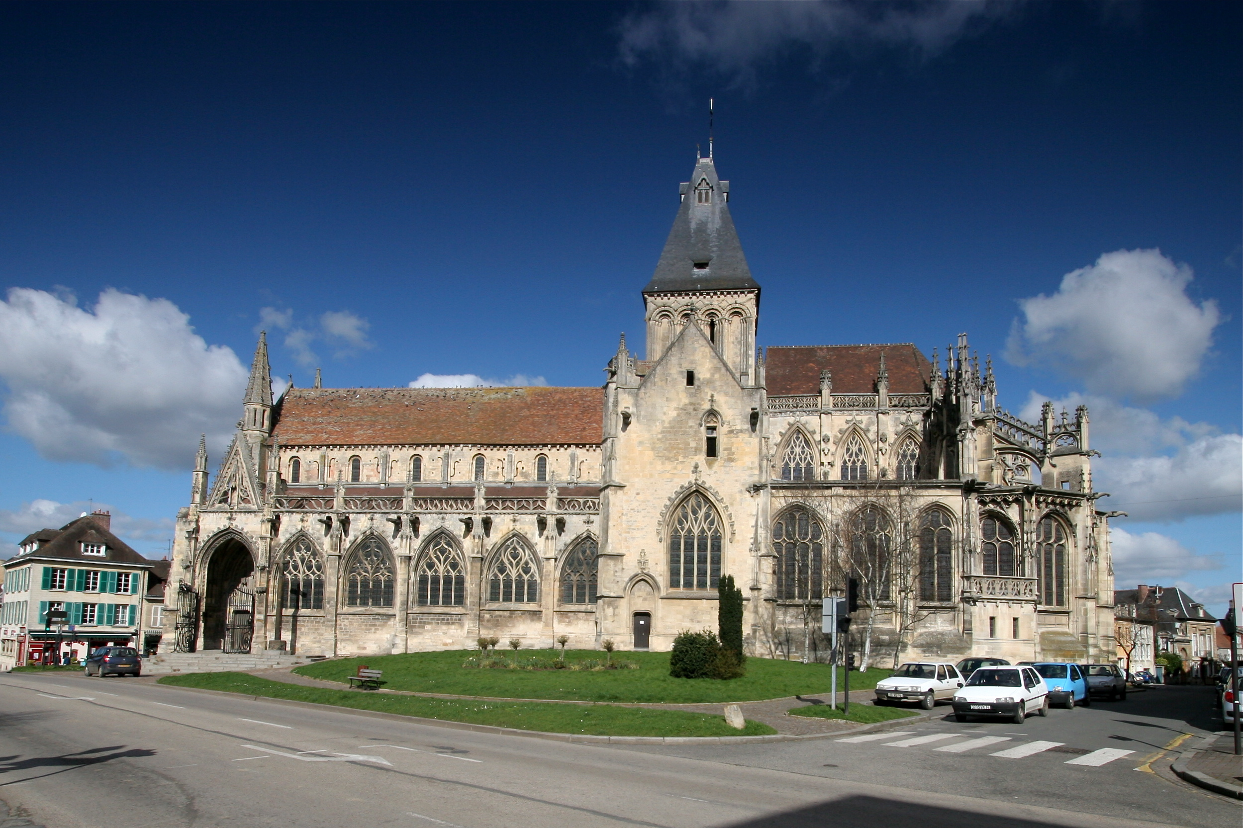 Façade sud de l'église Saint-Gervais de Falaise (Calvados, France)